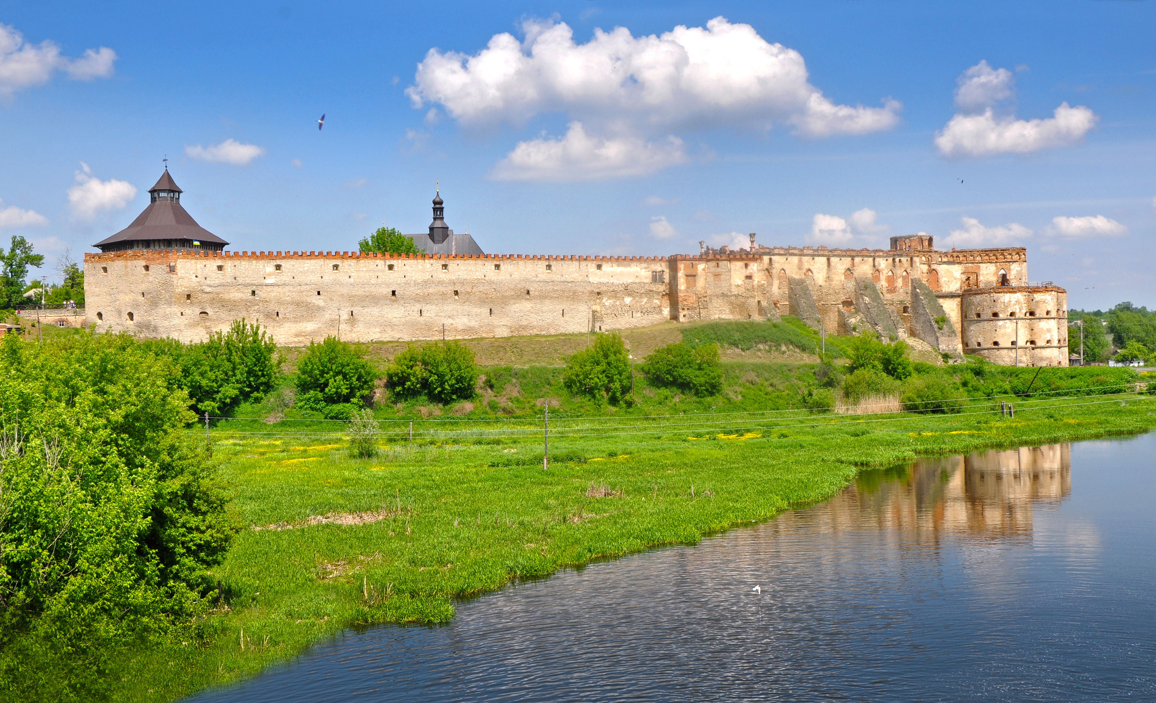 Замок (мур.), смт Меджибіж, вул. Жовтнева, 1